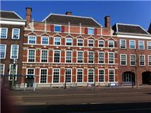 Kneuterdijk 22, Logement van de Vijf Steden